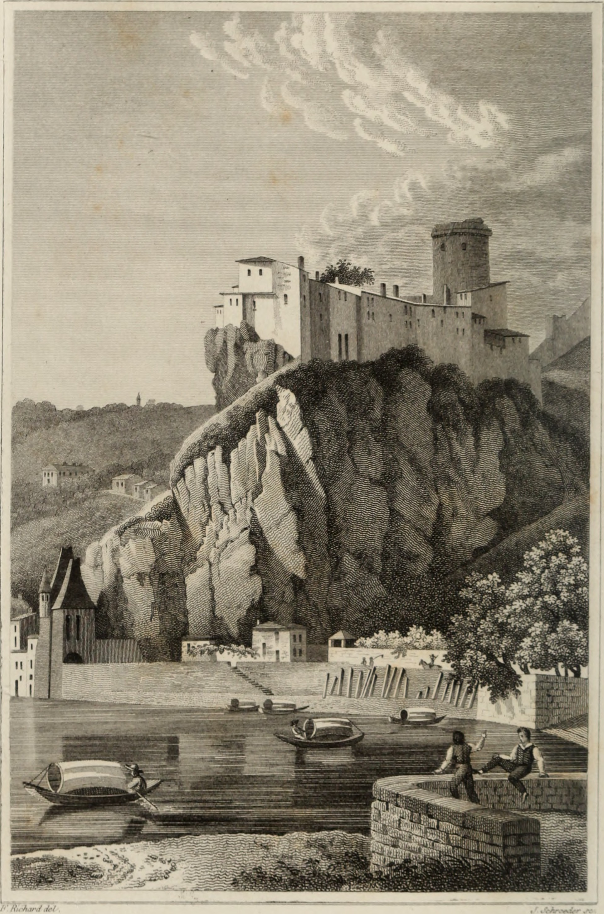 Château de Pierre-Scise (aujourd'hui disparu) en rive droite (côté sud) de la Saône, proche de l'actuel pont Koenig. Image par François Richard dans Pierre Clerjon, Histoire de Lyon : depuis sa fondation jusqu'à nos jours, vol. 3, 1830, page de frontispice, avant la page de présentation du titre. Title: Histoire de Lyon : depuis sa fondation jusqu'à nos jours Year: 1830 (1820s) Authors: Pierre Clerjon (1800-1832) ; Jérôme Morin ; Fleury François Richard (1777-1852) ; François Gabriel Théodore Basset de Jolimont (1787-1854) Subjects: Château de Pierre-Scise, Lyon Publisher: Lyons : T. Laurent Contributing Library: University of Toronto Digitizing Sponsor: University of Toronto View Book Page: Original book page About This Book: Catalog Entry View All Images: All Images From Book Click here to view book online to see this illustration in context in . Text Appearing Before Image: Librairie de Laurent, Place Saint-Pierre N° 1 Lyon. De l'imprimerie de Louis Perrin, rue Mercière, n° 49 Digitized by the Internet Archive in 2011 with funding from University of Toronto Text Appearing After Image: F. Richard del. | Chateau de Pierre-Scise Publié par Laurent, libraire à Lyon, Place St-Pierre, N° 1 (next page) Histoire de Lyon, depuis sa fondation jusqu'à nos jours; par P. Clerjon docteur en médecine, professeur d'anatomie et de physiologie à l’École royale des Beaux-Arts: ornée de figures d'après les dessins de F. F. Richard, membre correspondant de l'Institut, chevalier de la Légion d'Honneur. Tome troisième Lyon, Théodore Laurent, éditeur. M DCCC XXX [1830]